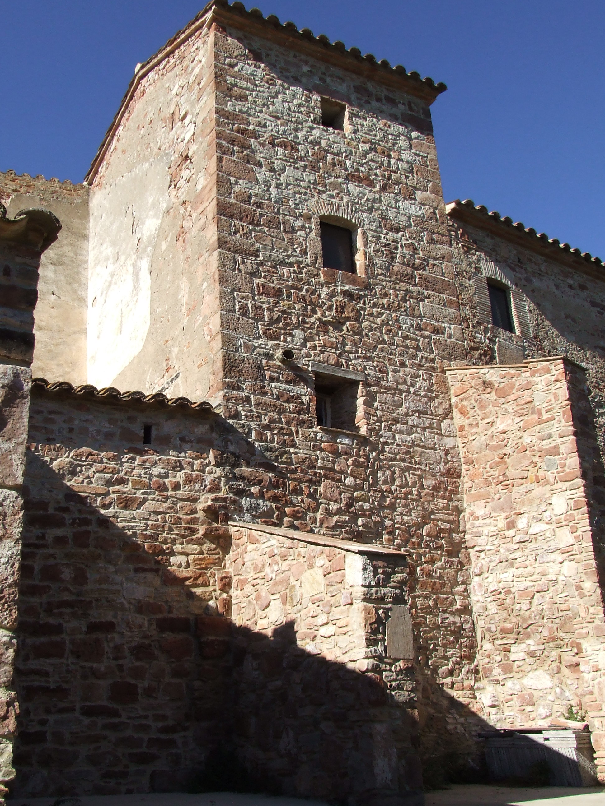 Torre de Can Garriga del Solell (Riells del Fai, Bigues i Riells, Vallès Oriental)